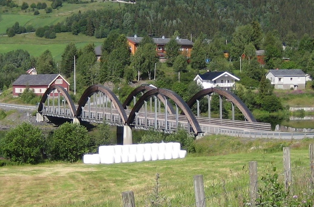 Ulnes bru over Strondafjorden